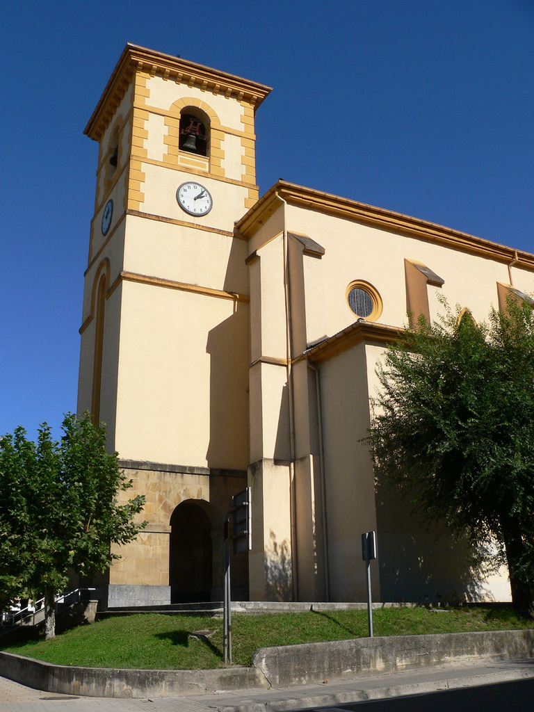 Iglesia del Sagrado Corazón de Jesús, Villabona (Guipúzcoa, España)